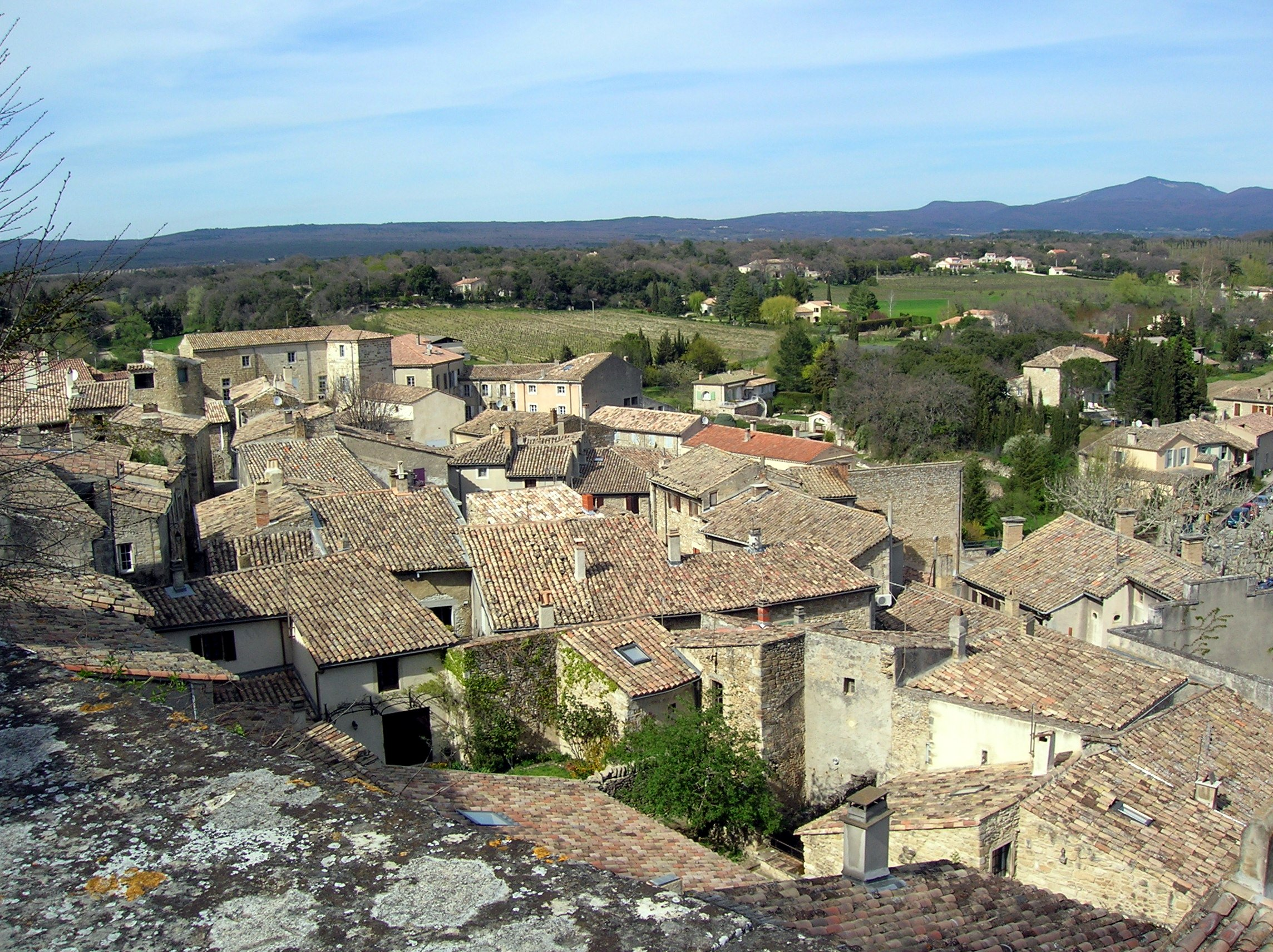 View of Grignan, Drôme, France Vue sur la ville de Grignan, Drôme, France